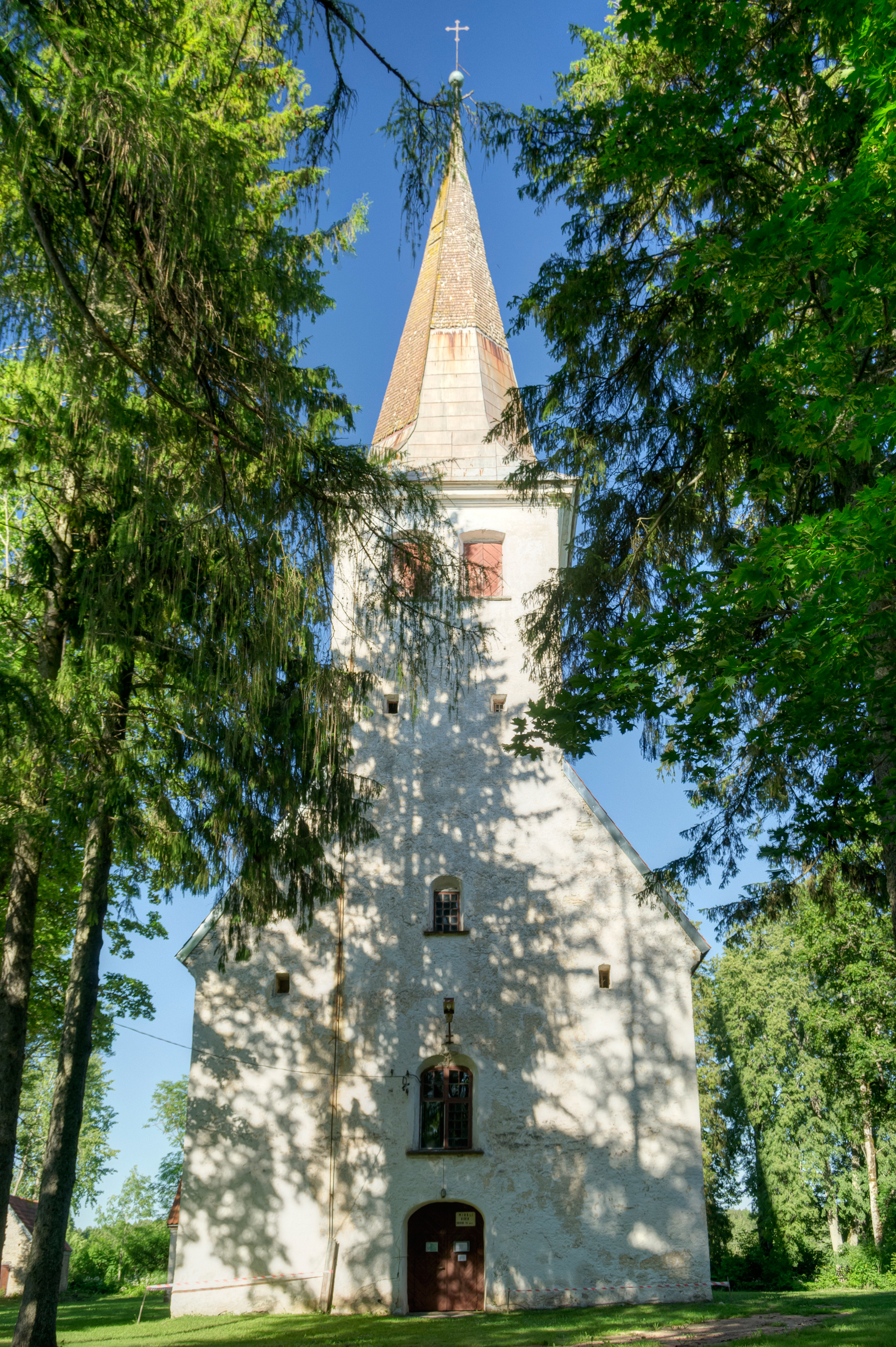 Mihkli Miikaeli kirik